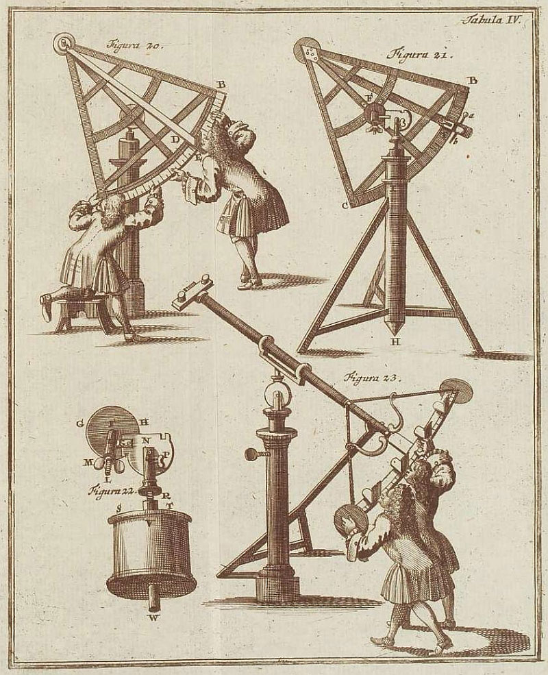 "Astronomische Handbuch" (Manual de astronomía) (Núremberg 1718)